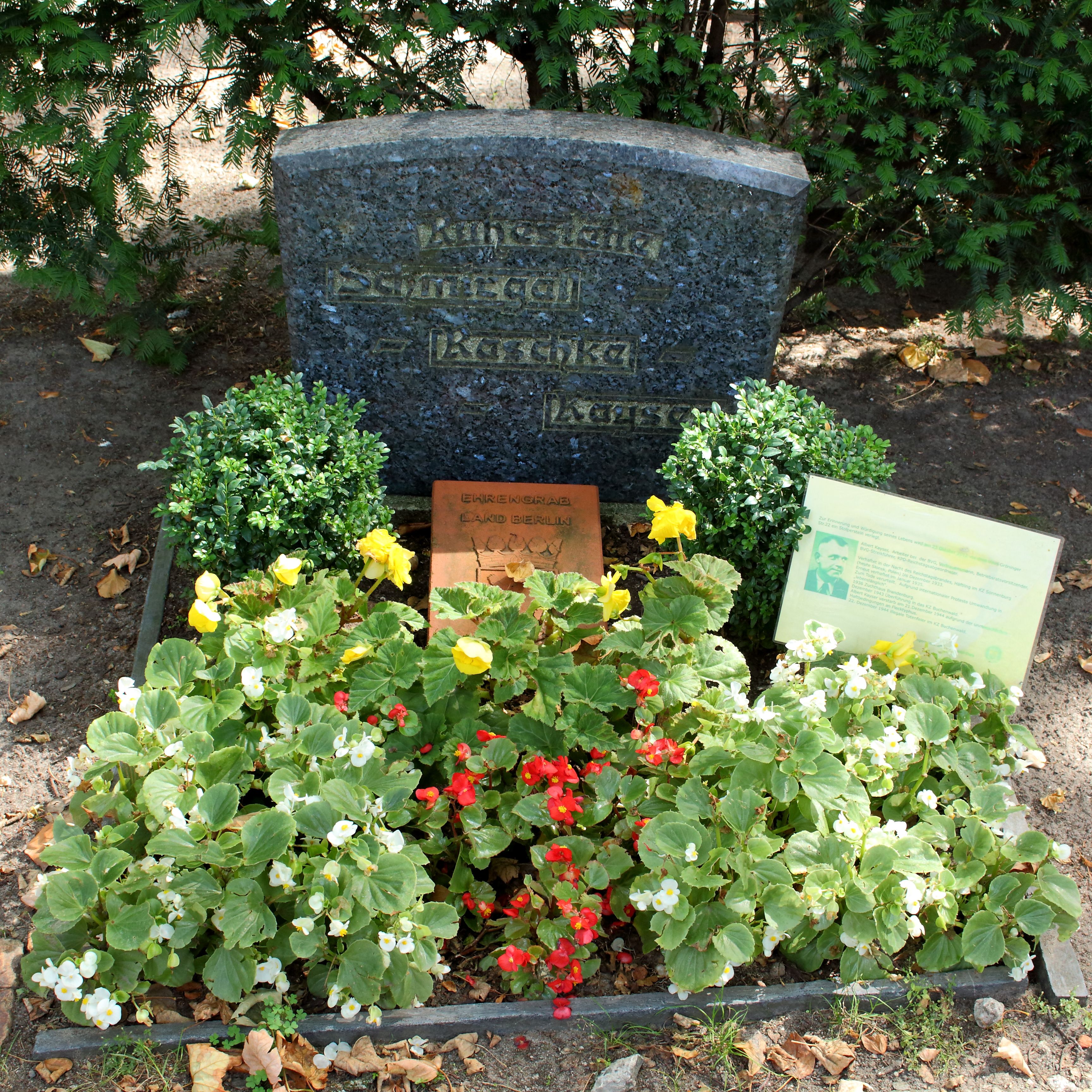 Ehrengrab von Otto Schmirgal, Marie Raschke (?) und Albert Kayser auf dem Urnenfriedhof Seestraße Abt. VIII-10-470